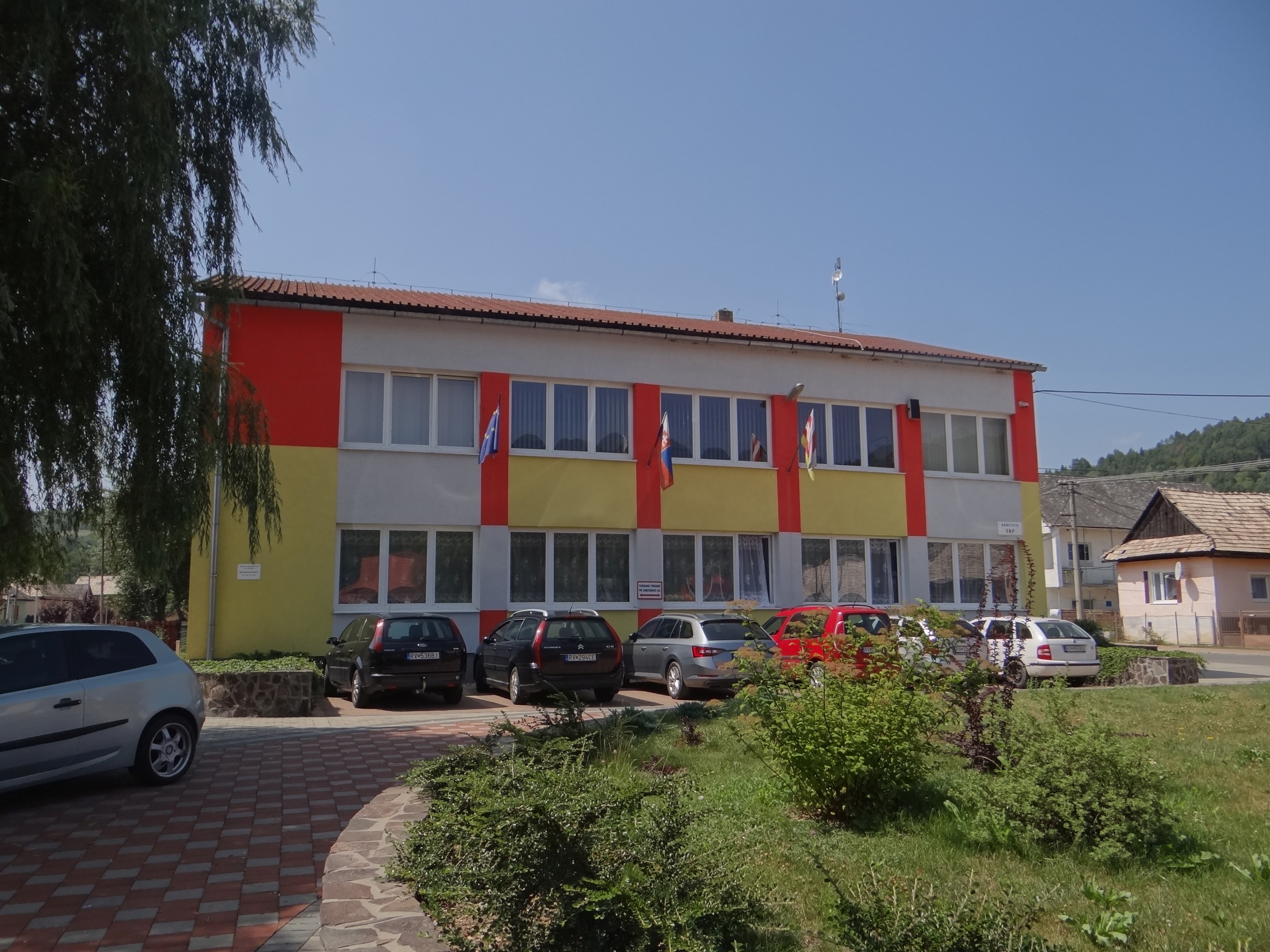 Nižná Slaná